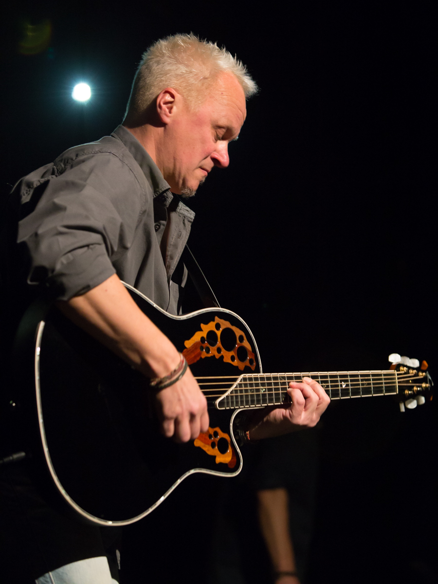 Ulli Brand bei einem Konzert von Farfarello in der Harmonie, Bonn